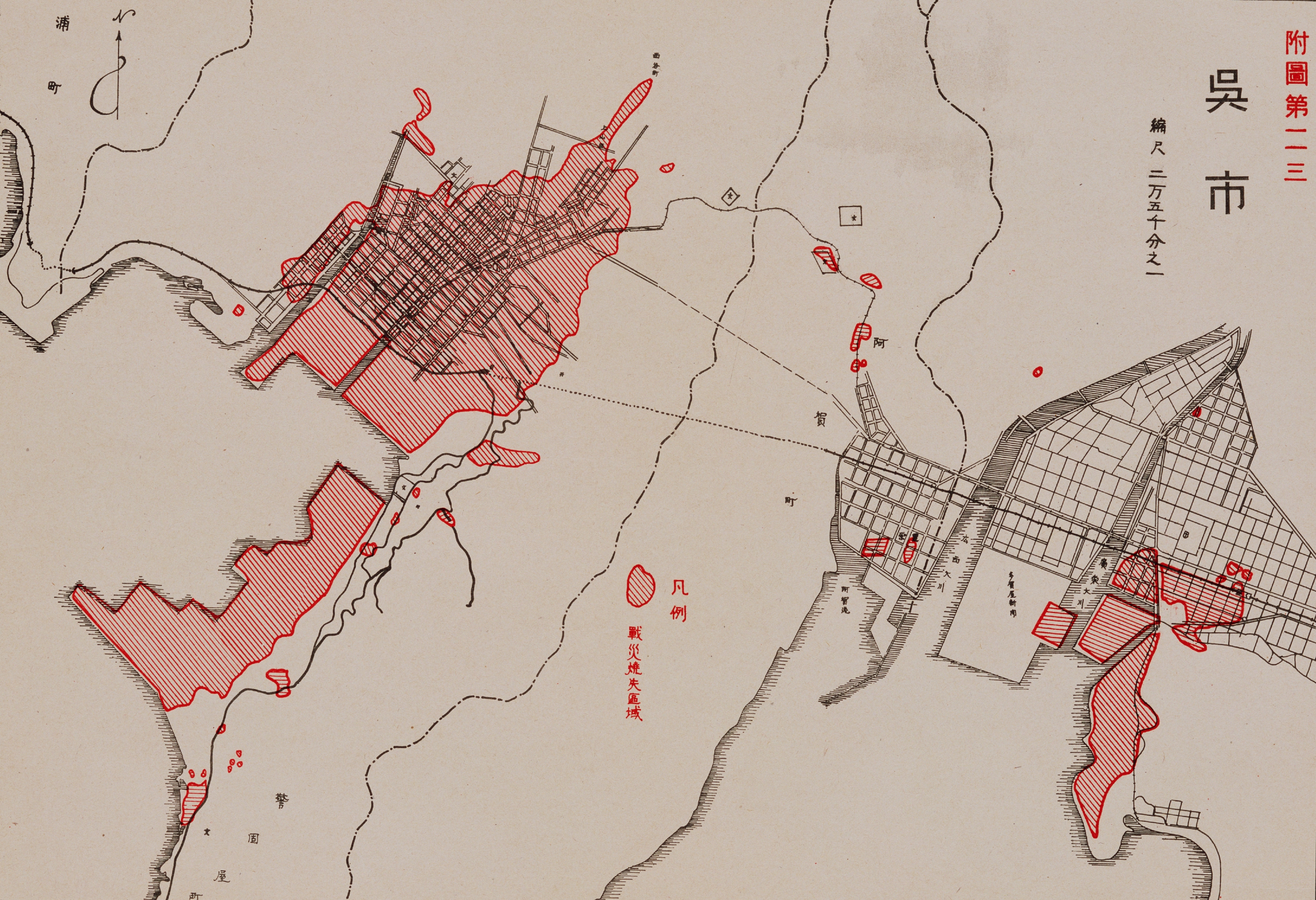 戦災概況図呉 , 1945年12月第一復員省作成